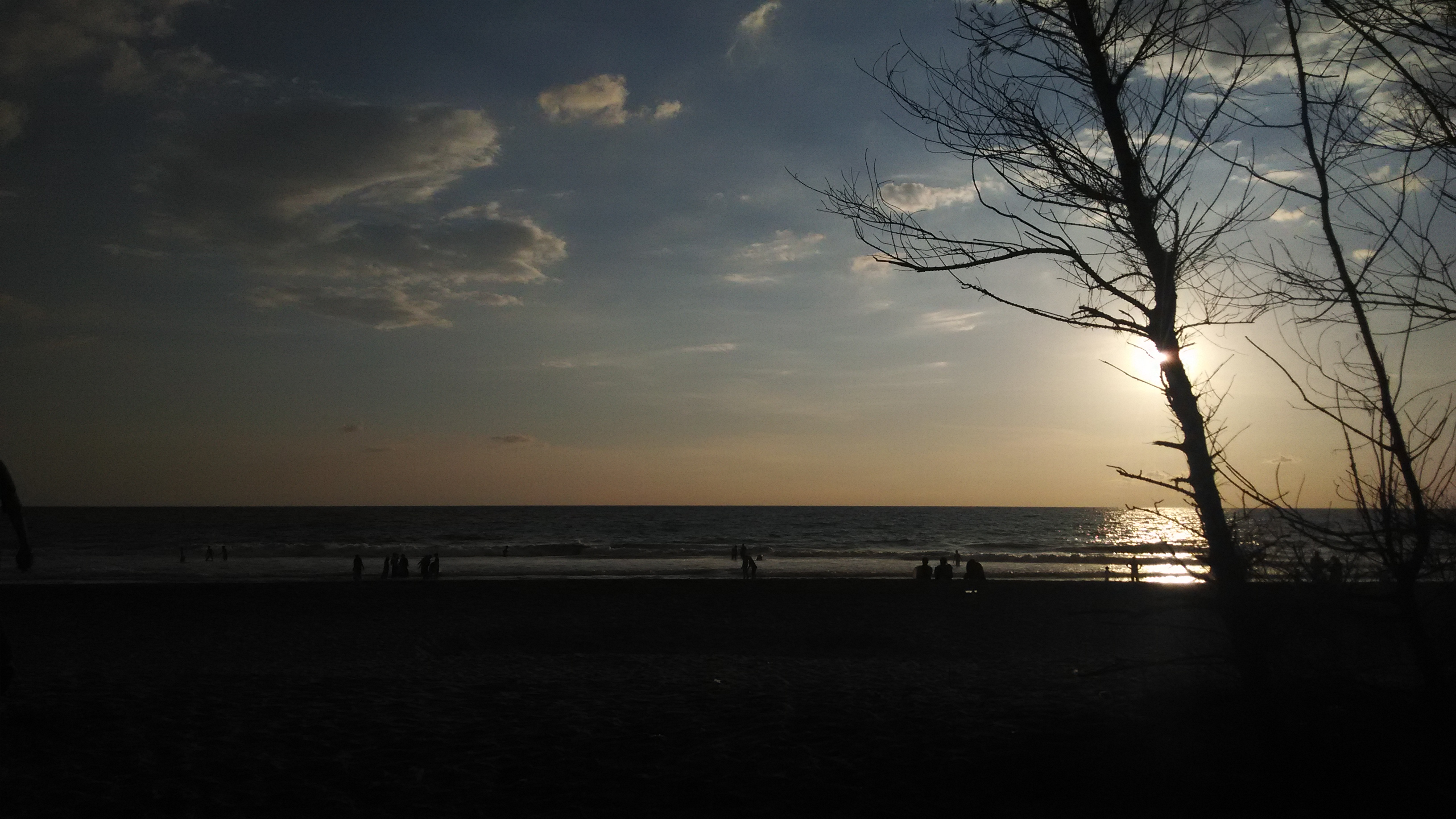 Sunset at Kappil beach, Kollam